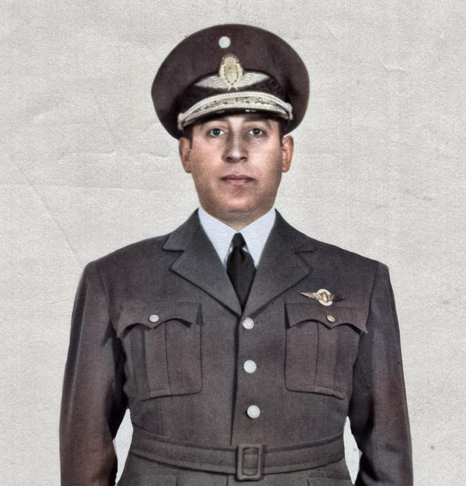 El Brigadier General Carlos Mauriño.